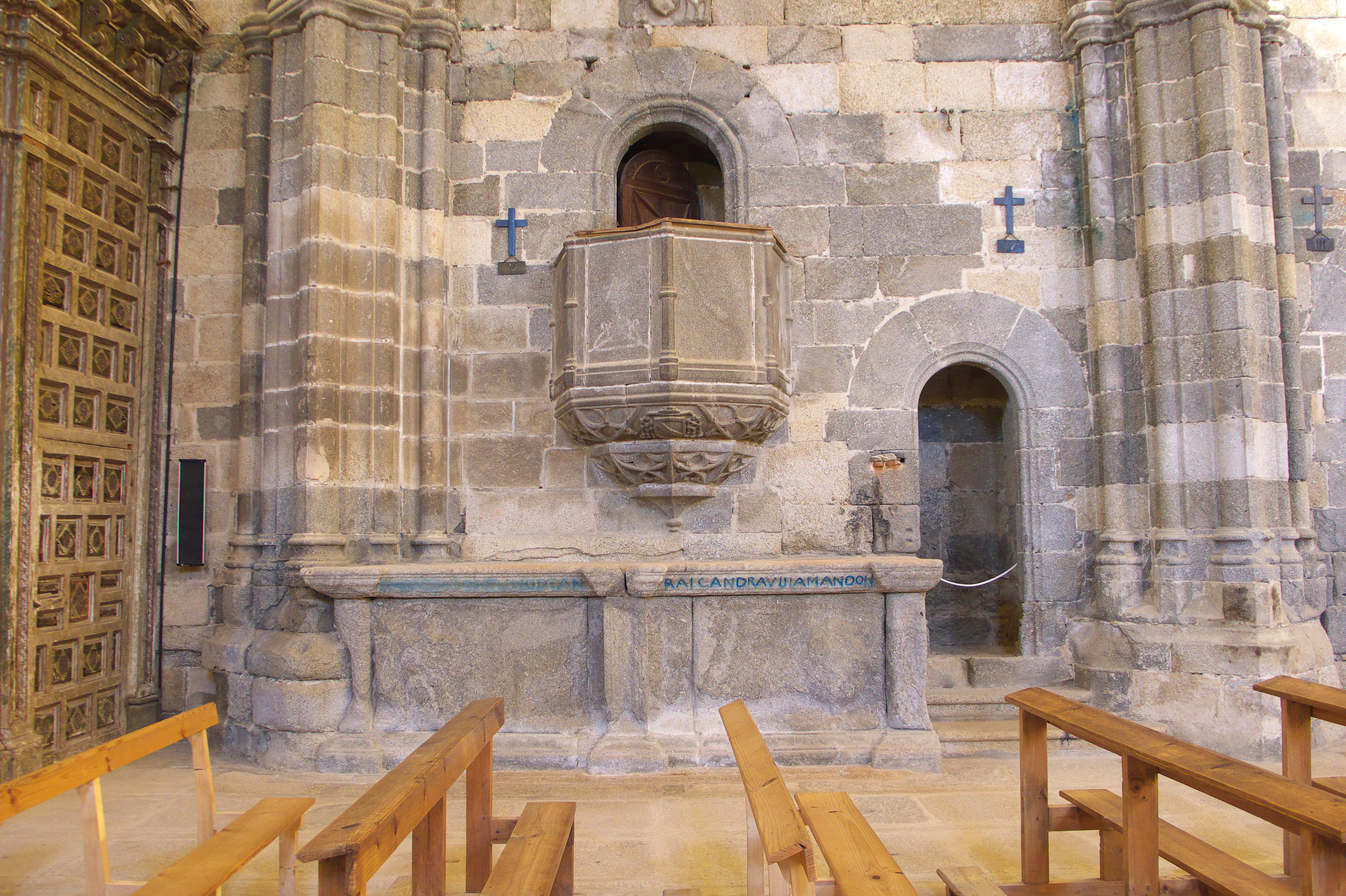 Detalle del púlpito